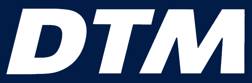 Deutsche Tourenwagen Masters